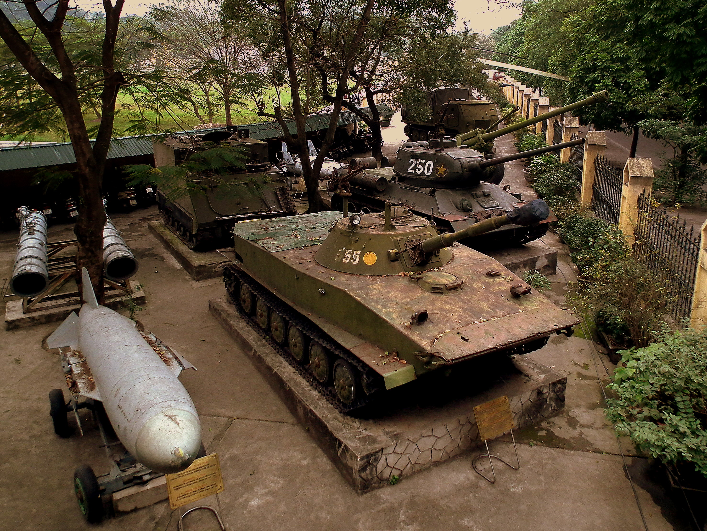 ARMY MUSEUM HA NOI VIETNAM FEB 2012